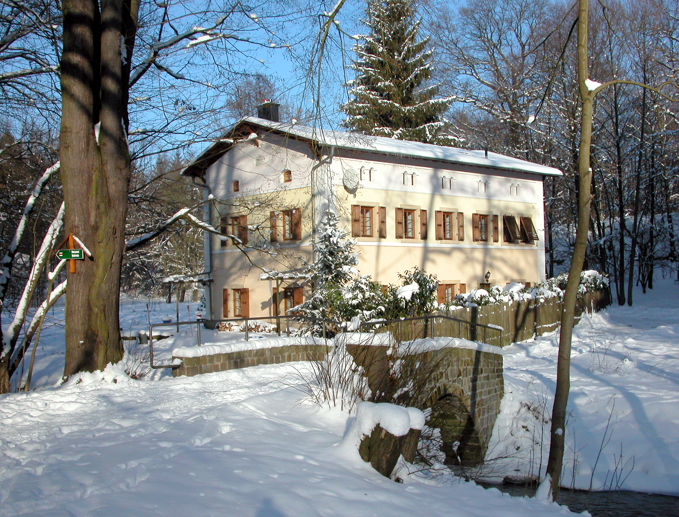 10.01.2009 01454 Radeberg: Die Knochenmühle (GMP: 51.120345,13.935370) umgangssparchlich Knochenstampe, im Hüttertal an der Großen Röder. Erbaut wurde die Wassermühle um 1859 von Carl Gottfried Mißbach, dem Besitzer der unweit entfernten Hüttermühle. Nach der Wende saniert und zum Wohnhaus ausgebaut. Davor die denkmalgeschützte Naturstein-Bogenbrücke. [DSCN35380.TIF]20090110050DR.JPG(c)Blobelt